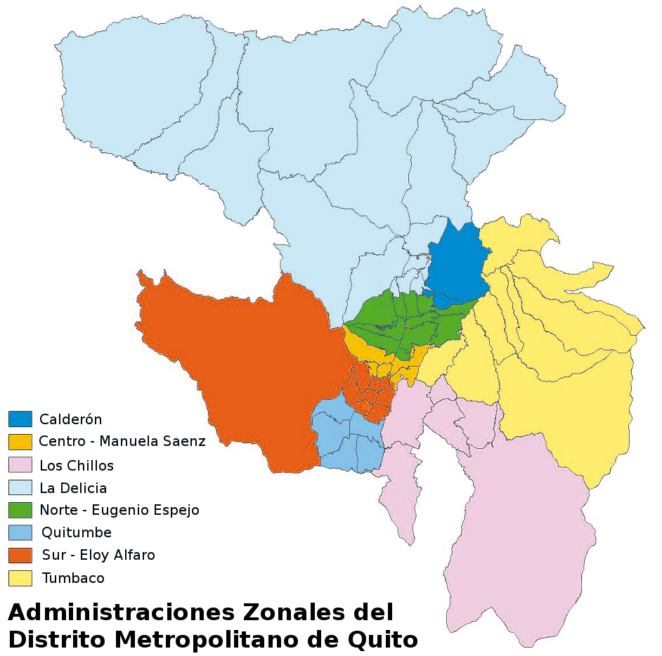 Mapa de las 8 Administraciones Zonales de Quito